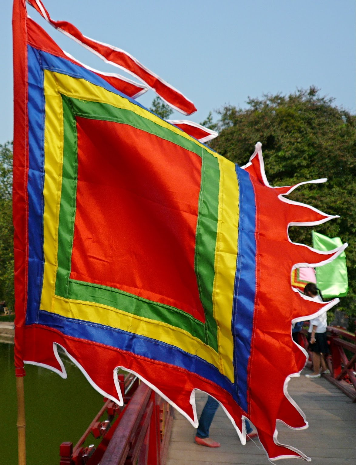 Một lá cờ ngũ sắc mừng Đại lễ 1000 năm Thăng Long - Hà Nội tung bay phất phới trên cầu Thê Húc, ngày 7 tháng 10 năm 2010.